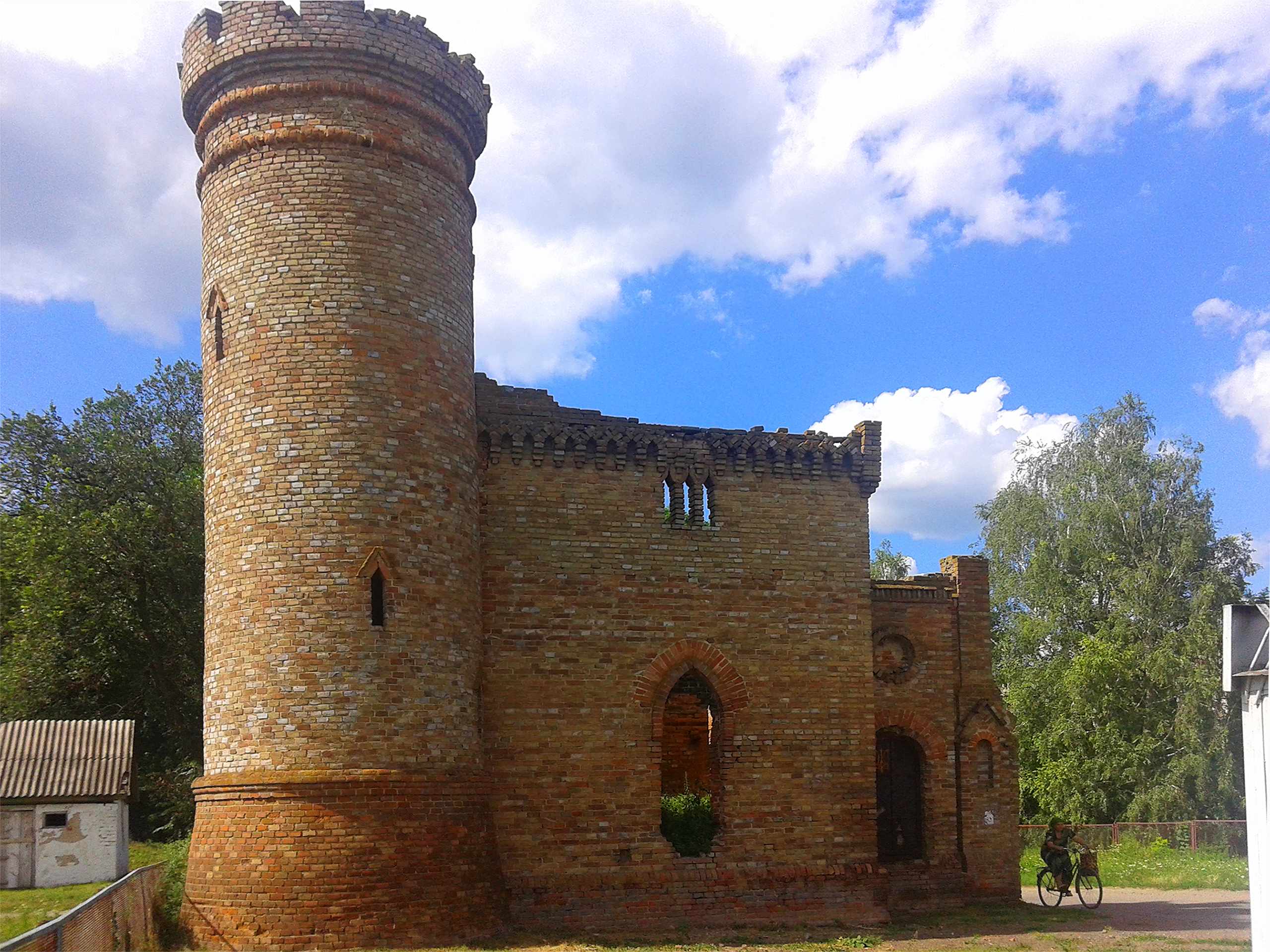 Садиба де Бальменів, в якій у 1873р. бував Т.Г. Шевченко, поет, О.С. Афанасьєв-Чубинський, Є.П. Гребінка, Н.В. Кукольник, художники Л.М. Жемчужников, Є.Ф. Крендовський, К.І. Рабус, смт. Линовиця, центр